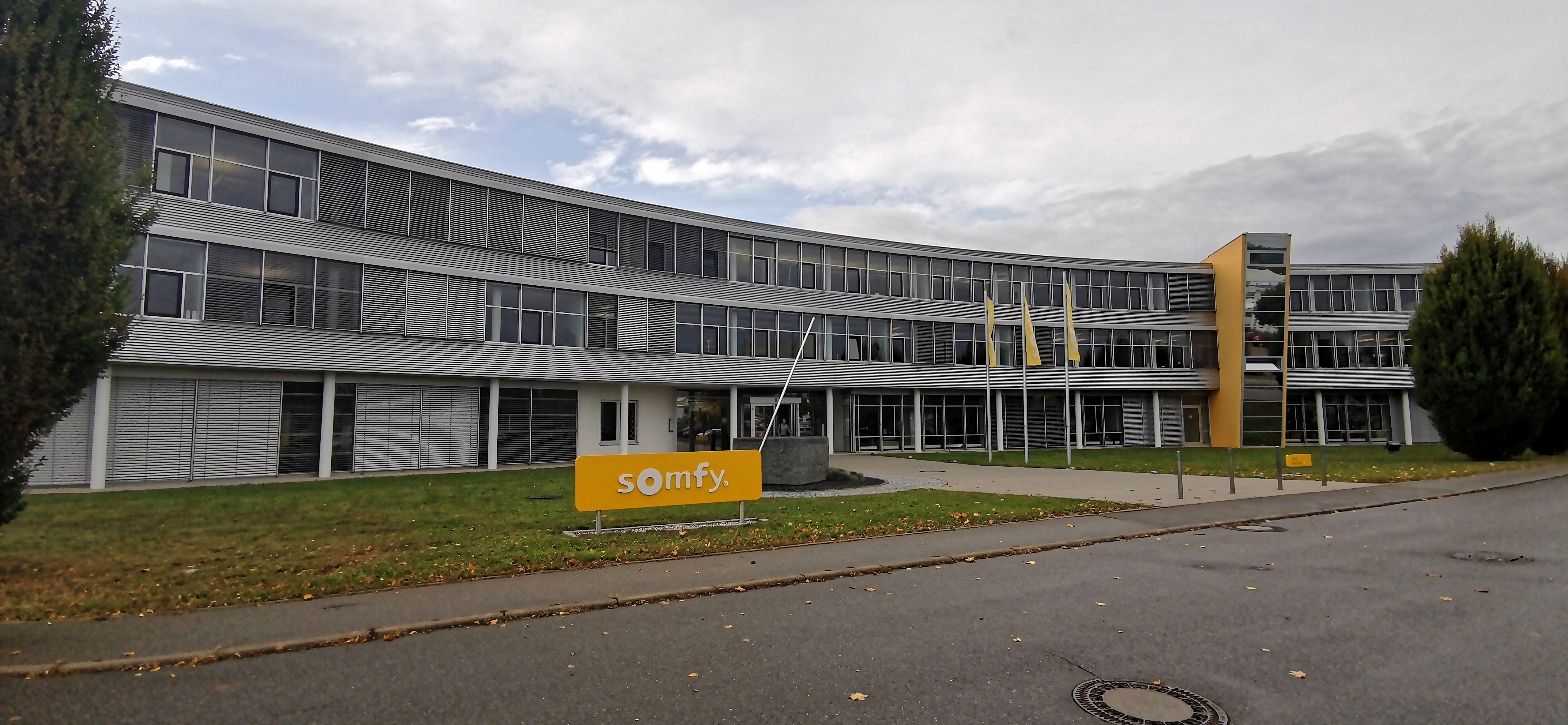 Rottenburg am Neckar 2019